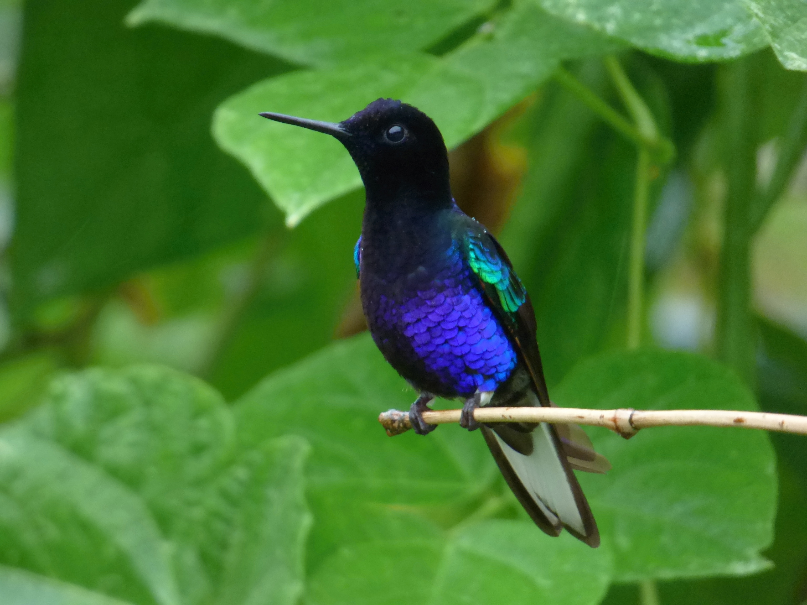 Boissonneaua jardinii (Colibrí alirrufo)